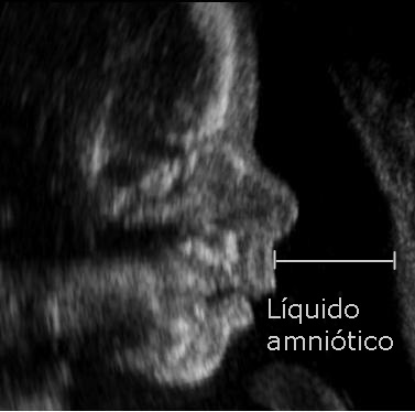 Sagittal view of a fetal face.Profil d'un embryon de 22 semaines.